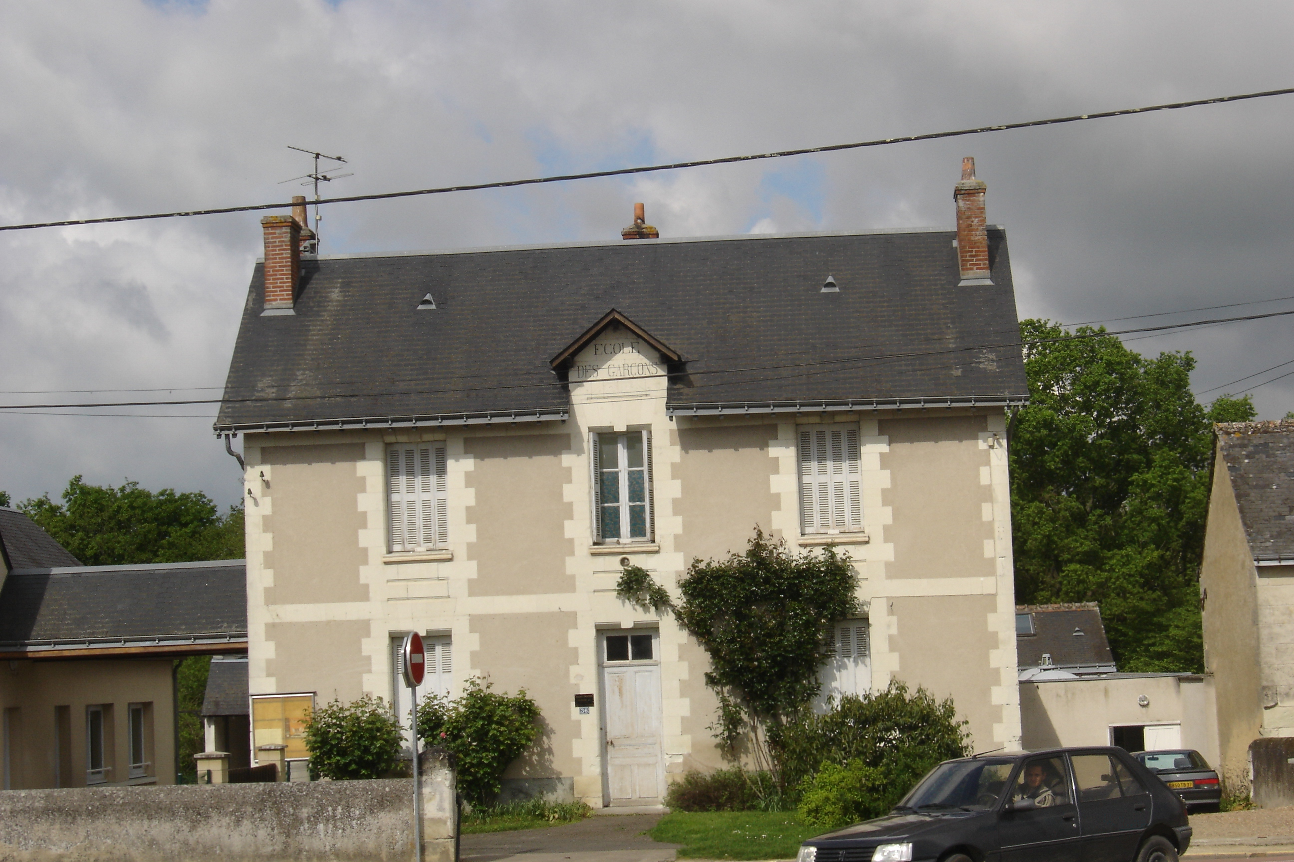 Cerelles (F37), école de garçons.